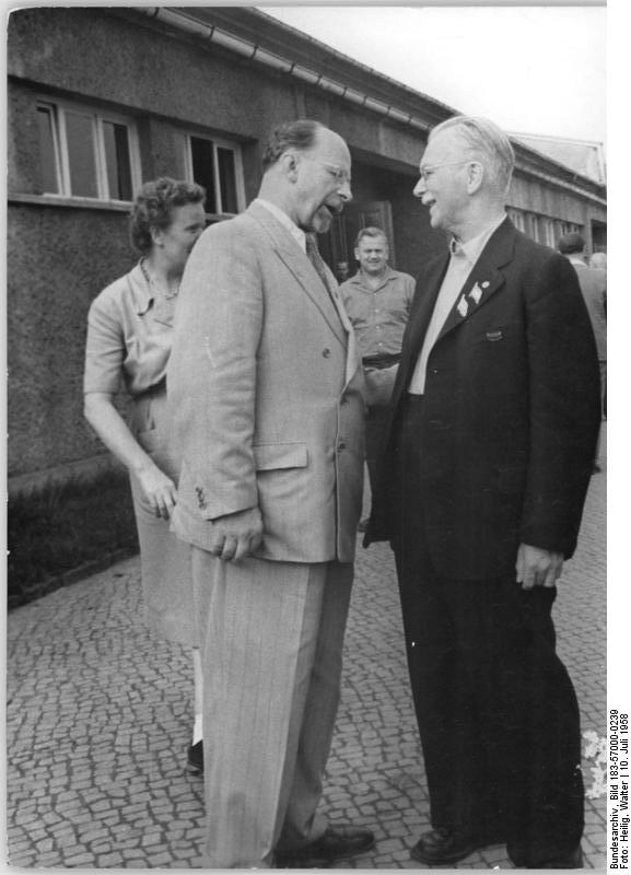 Zentralbild Heilig 11.7.1958. V. Parteitag der SED vom 10. bis 16.7.1958 in der Werner-Seelenbinder-Halle, Berlin, 2. Tag. UBz: In einer Tagungspause unterhält sich der Erste Sekretär des ZK der SED, Walter Ulbrich (links), mit dem Parteiveteranen Kurt Böhme, ehemaliger Oberbürgermeister von Gera.